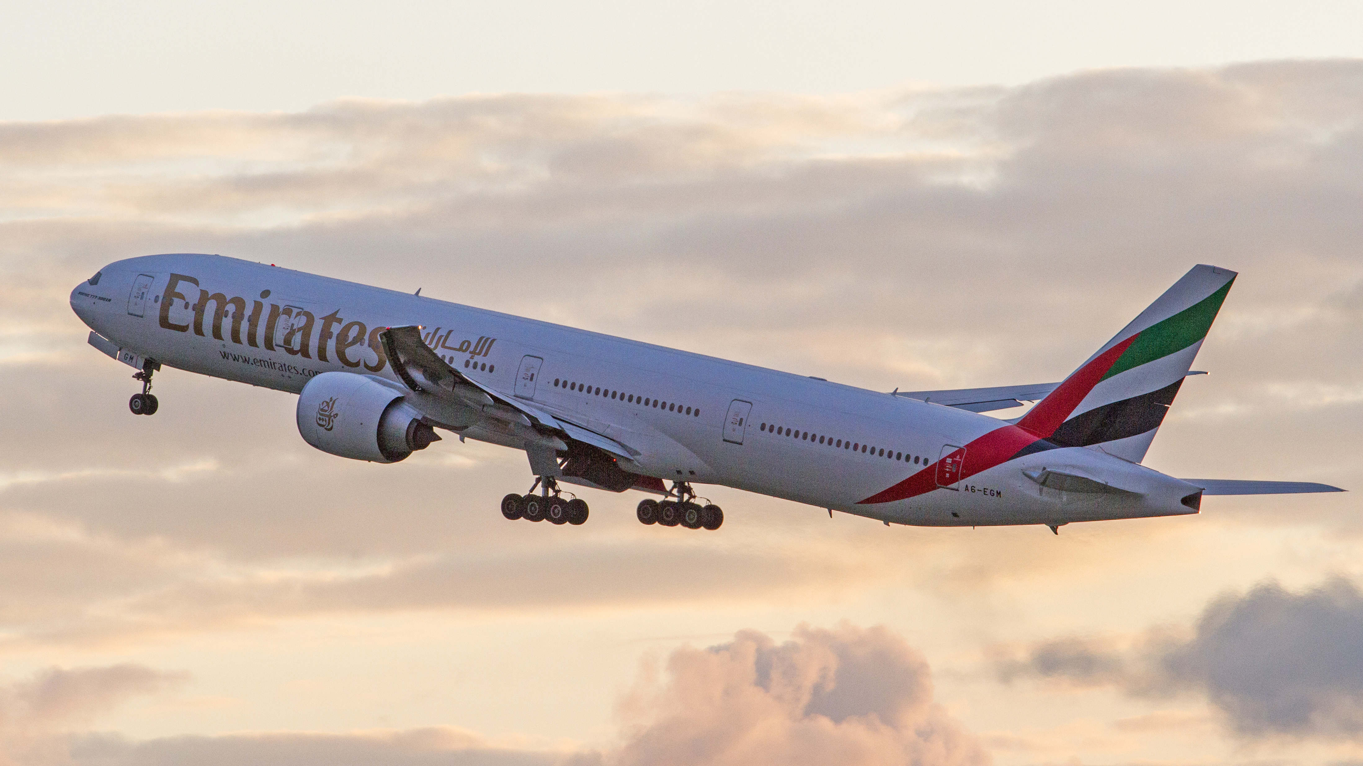 Emirates B777